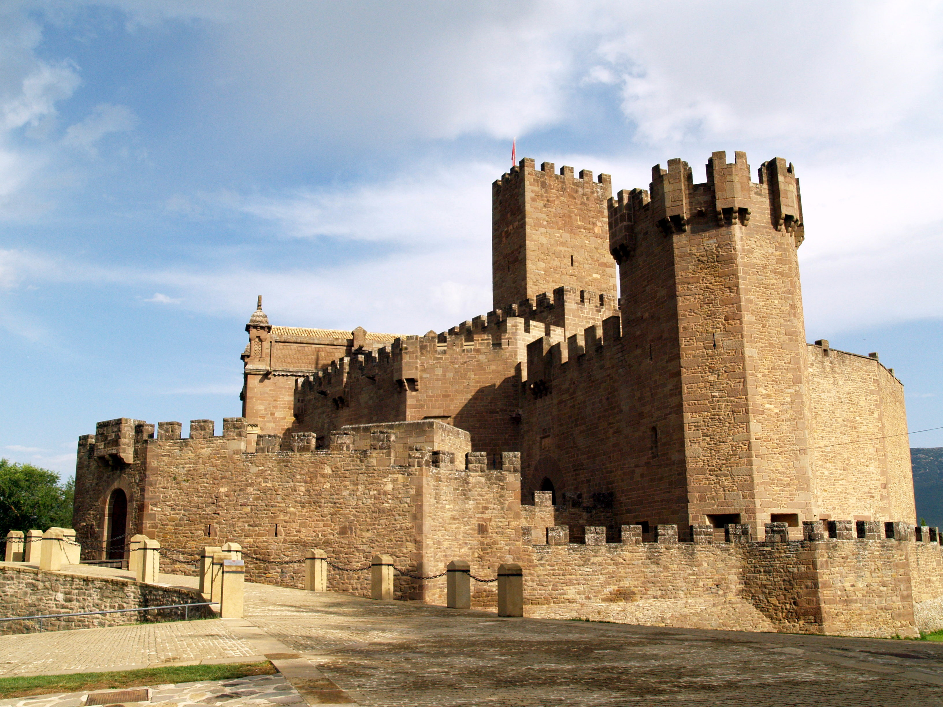 Castell de Javier